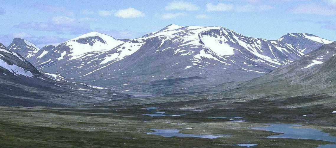 Ruotesmassivet i Sarek